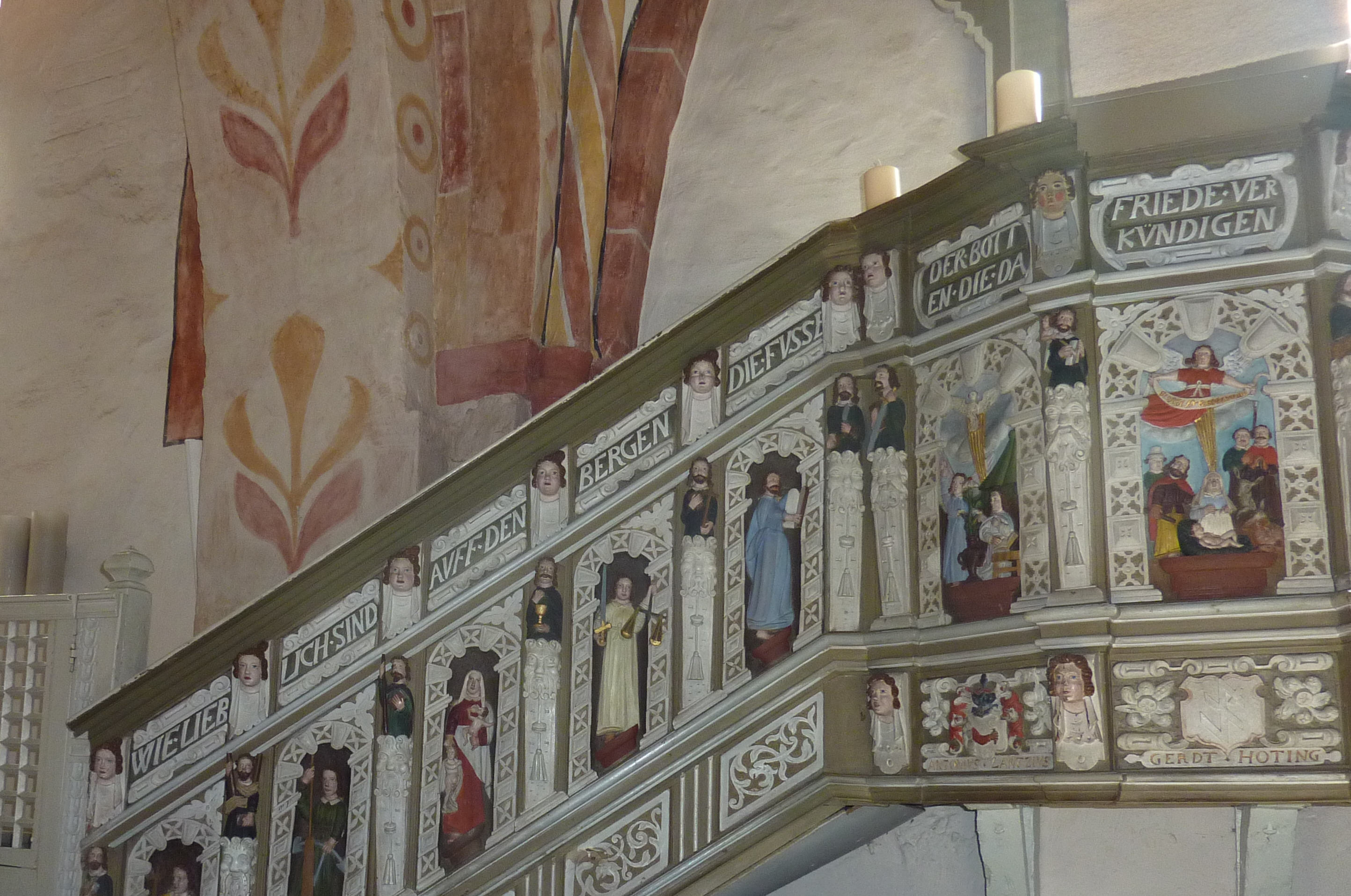 Kanzel in St. Johannes, Bad Zwischenahn, Detail